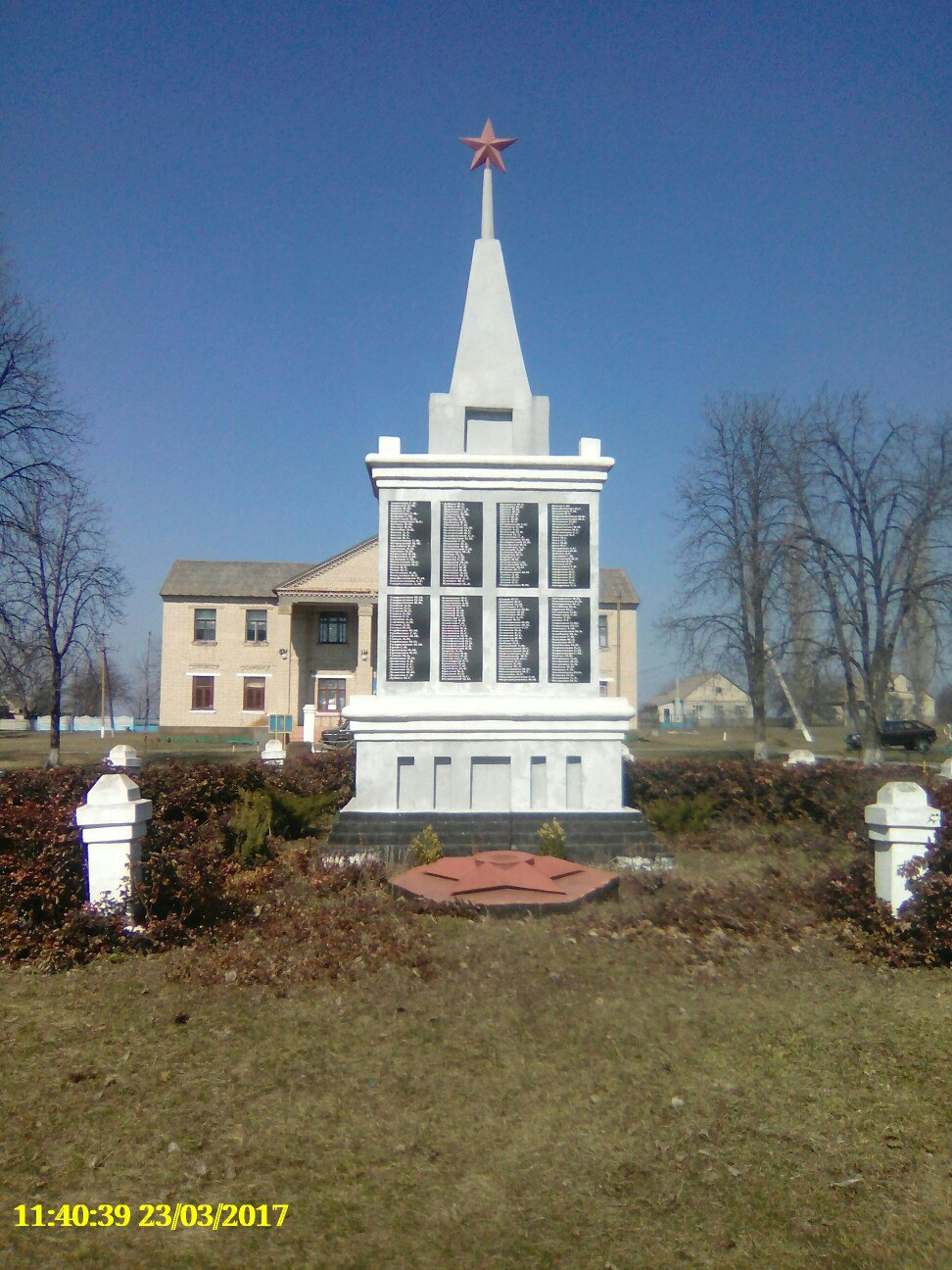 Група могил: 1 братська могила радянських воїнів, 1 братська могила радянських партизан